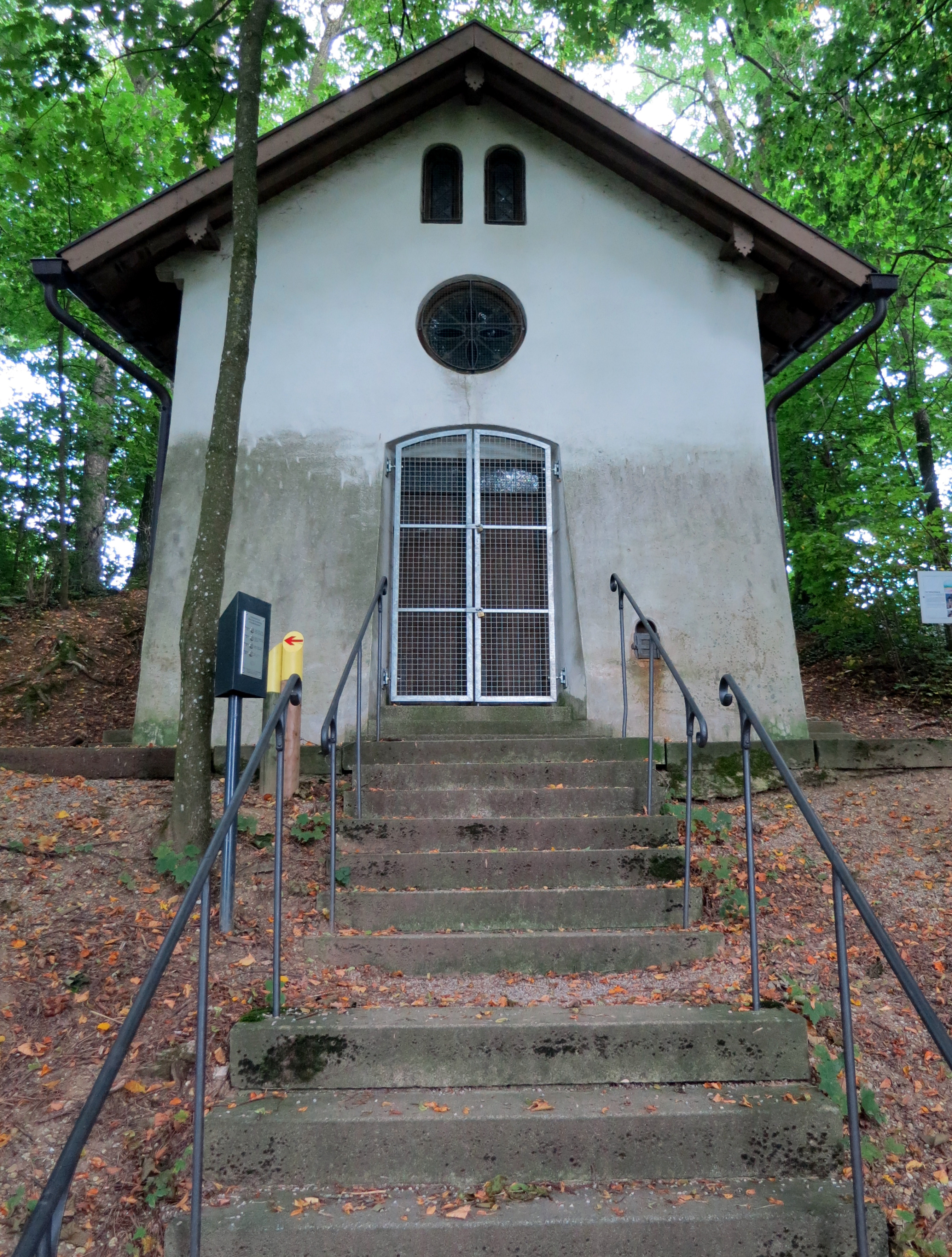 Kalvarienberg, östlich von Altomünster, Aufgang zur Kapelle, links und rechts Kreuzwegstationen